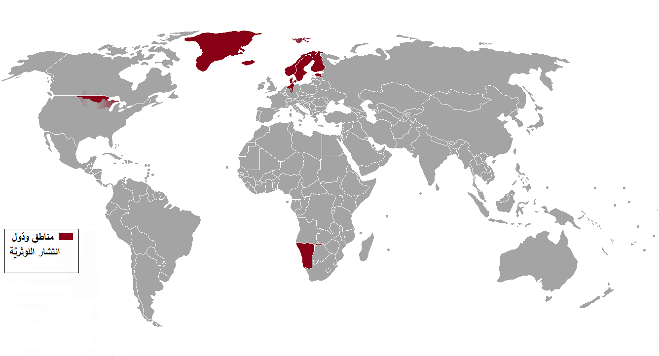 خريطة توضح انتشار اللوثريَّة حول العالم.